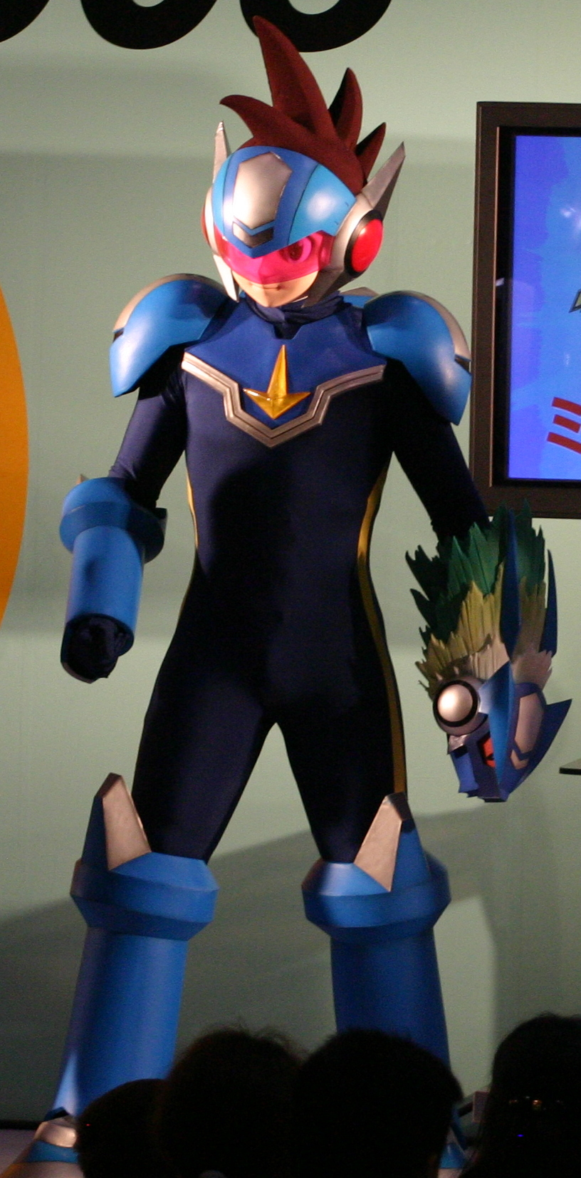 2006東京電玩展，《流星洛克人》小遊戲大賽。